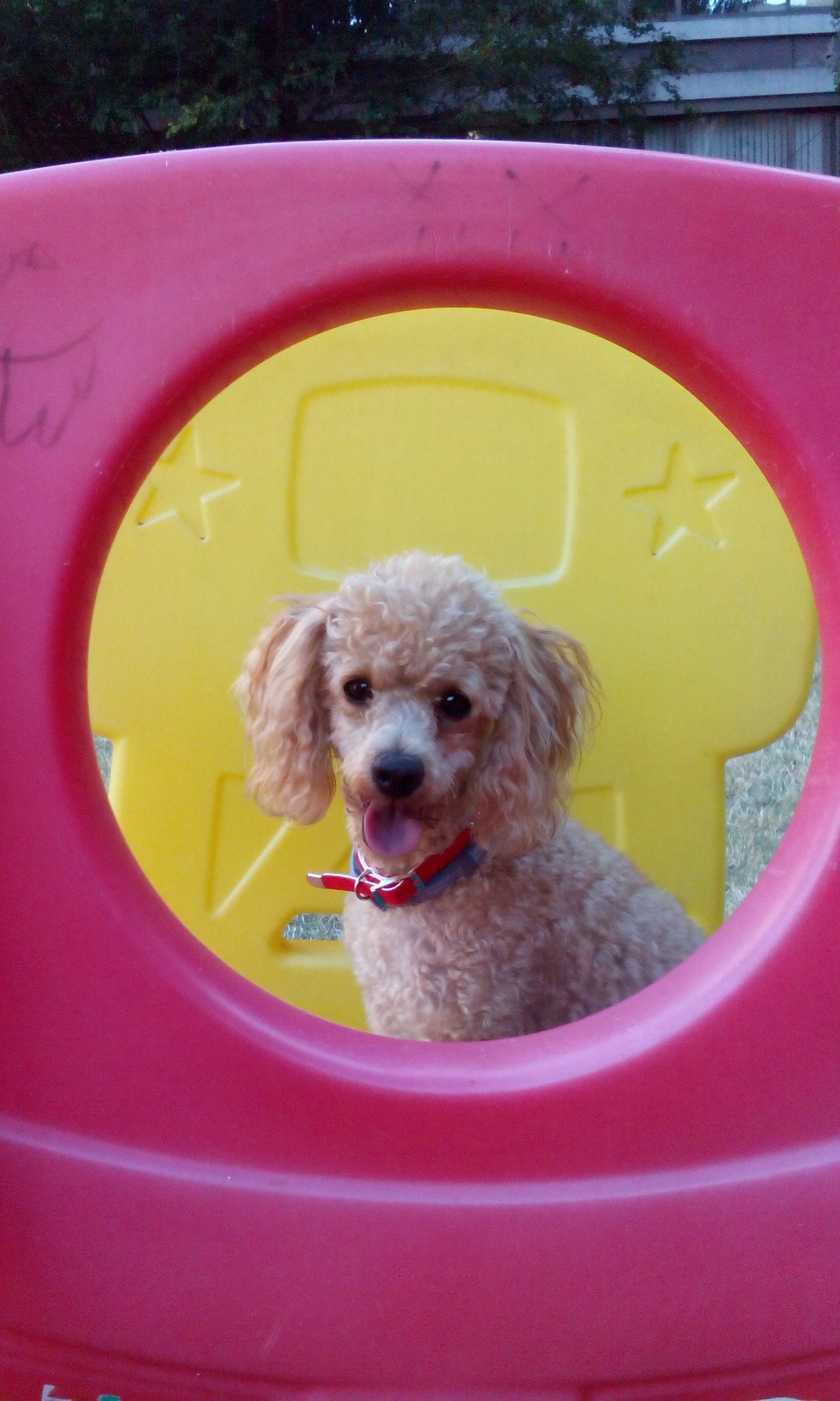 Пудла на дечјем тобогану